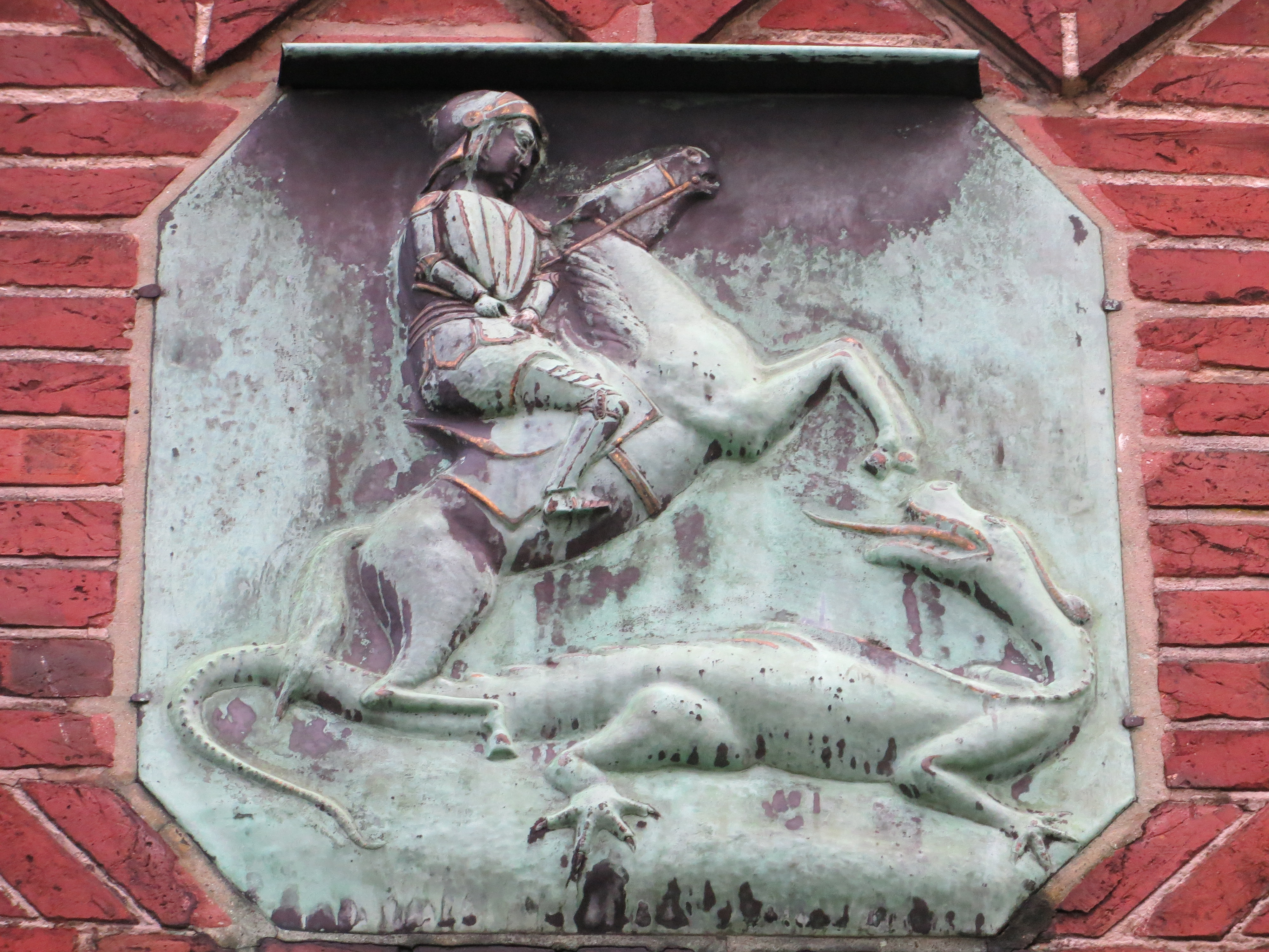 Tafel des Heiligen Georgs am Gemeindehaus der St. Jürgen-Kirche (Flensburg), Jürgensgaarder Straße 1, Bild 02